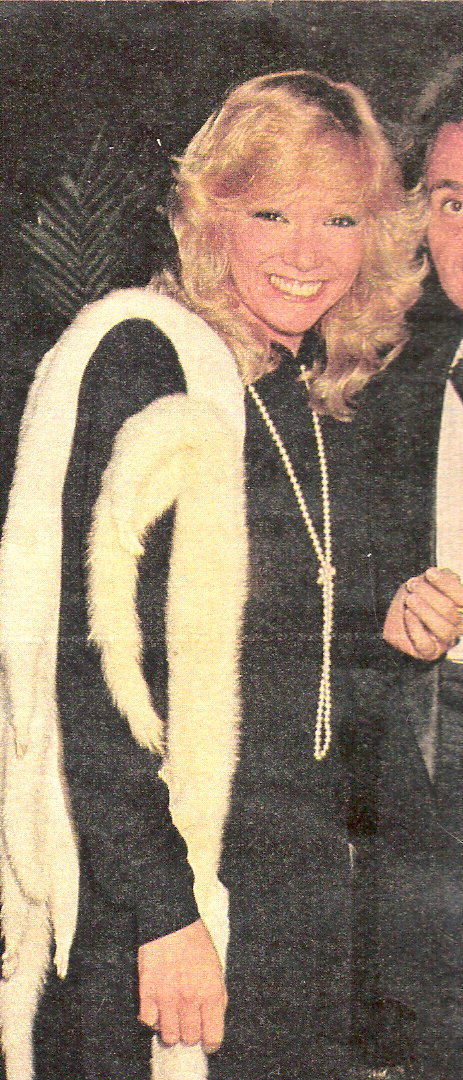 Soledad Silveyra, 1983